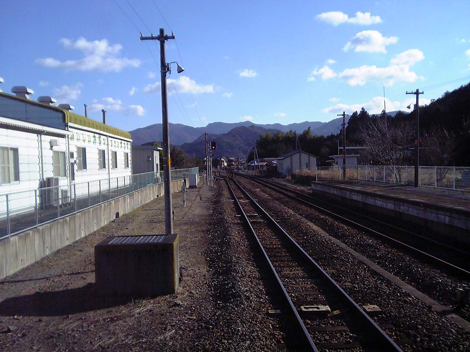 栃原駅ホームから見た川添駅方面